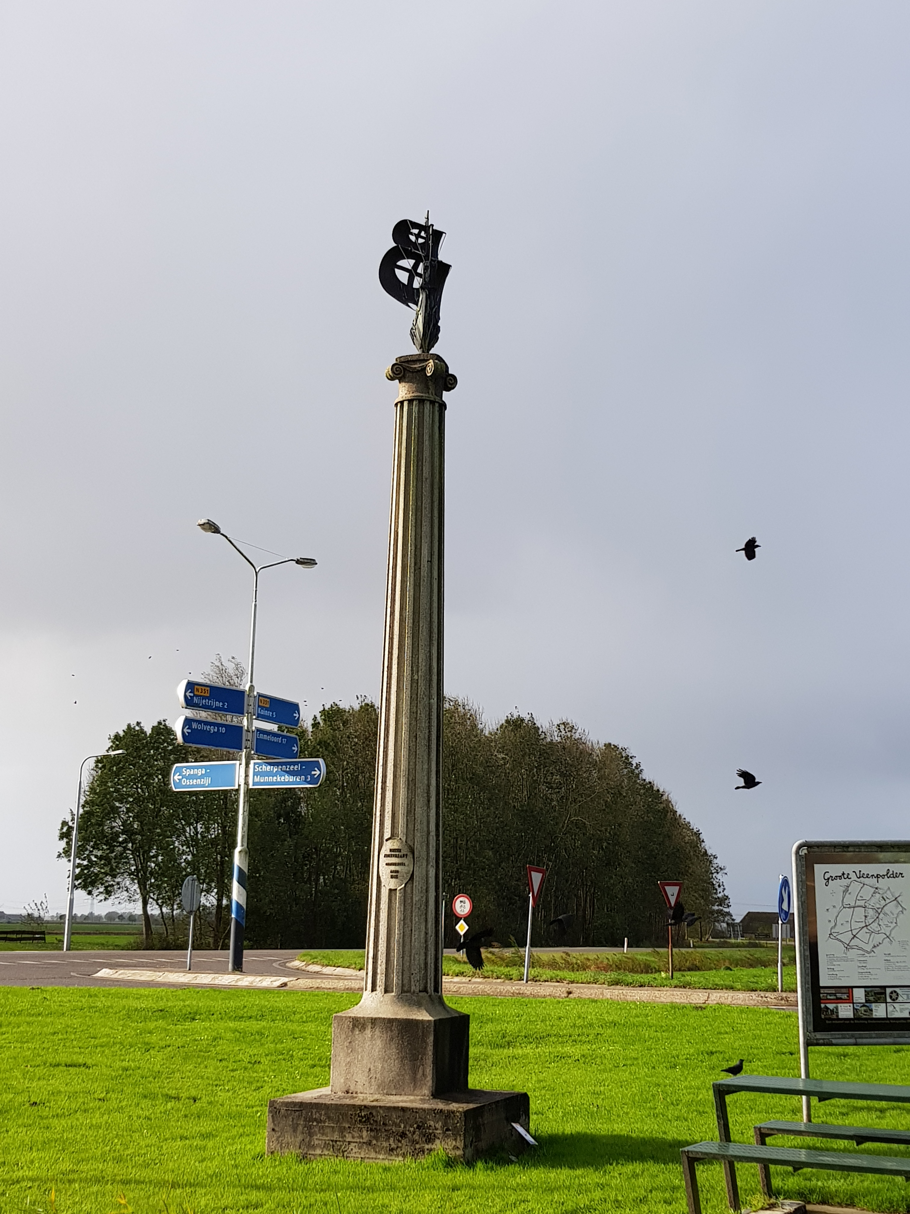 Gedenknaald Peter Stuyvesant, Scherpenzeel, Nederland